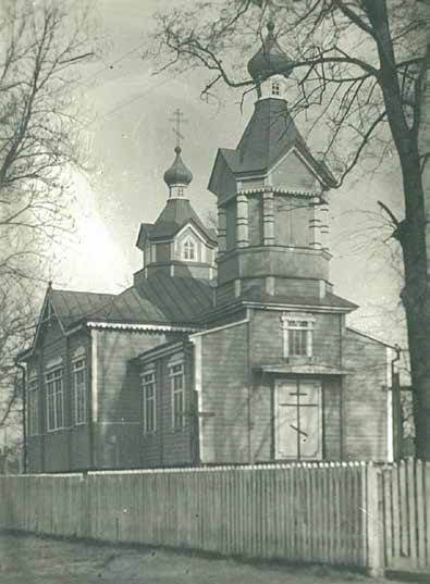 Беларуская (тарашкевіца): Мілейчыцы (Milejčycy). Барбараўская царква- :be-tarask:мураўёўкі}мураўёўка